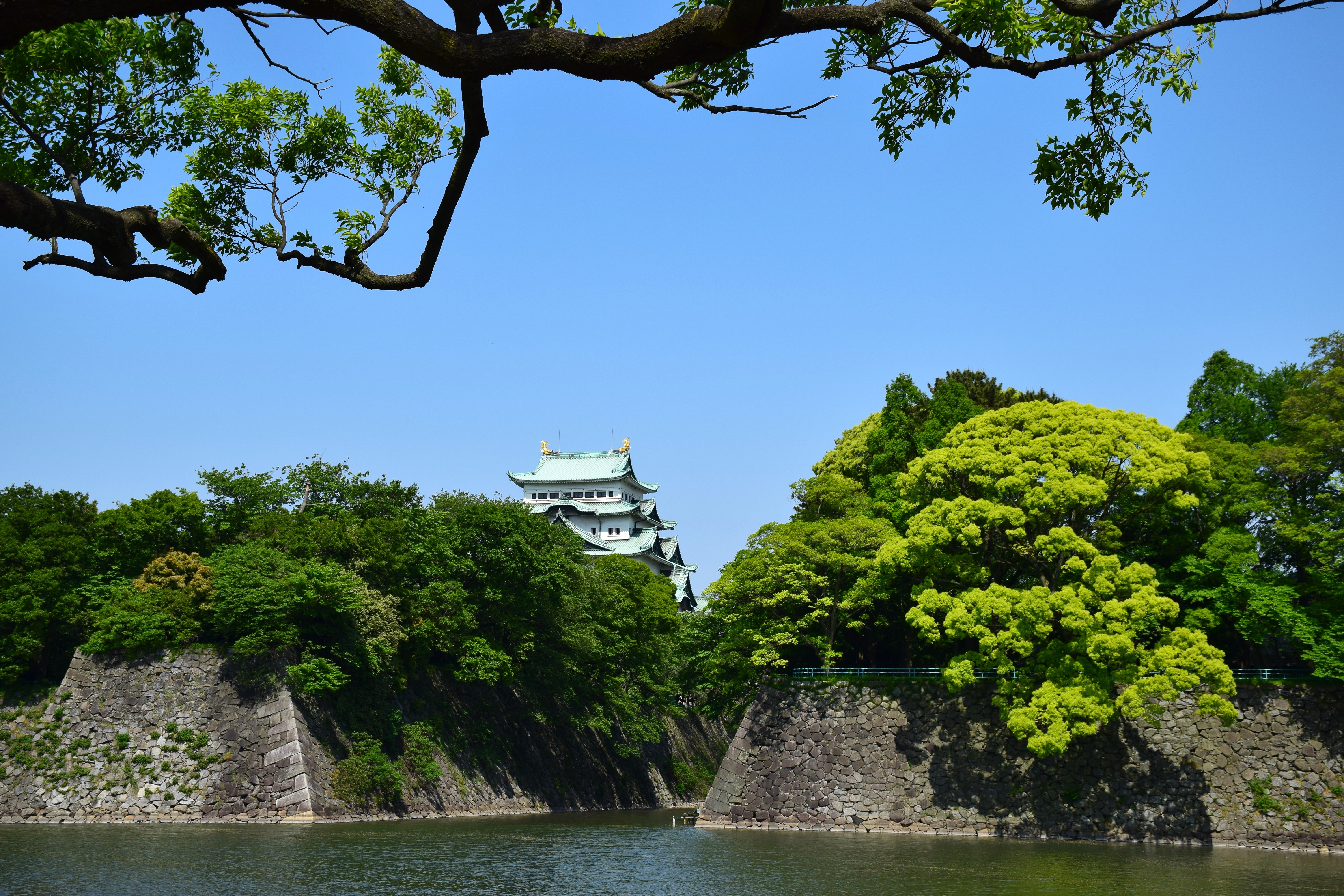 名古屋城天守